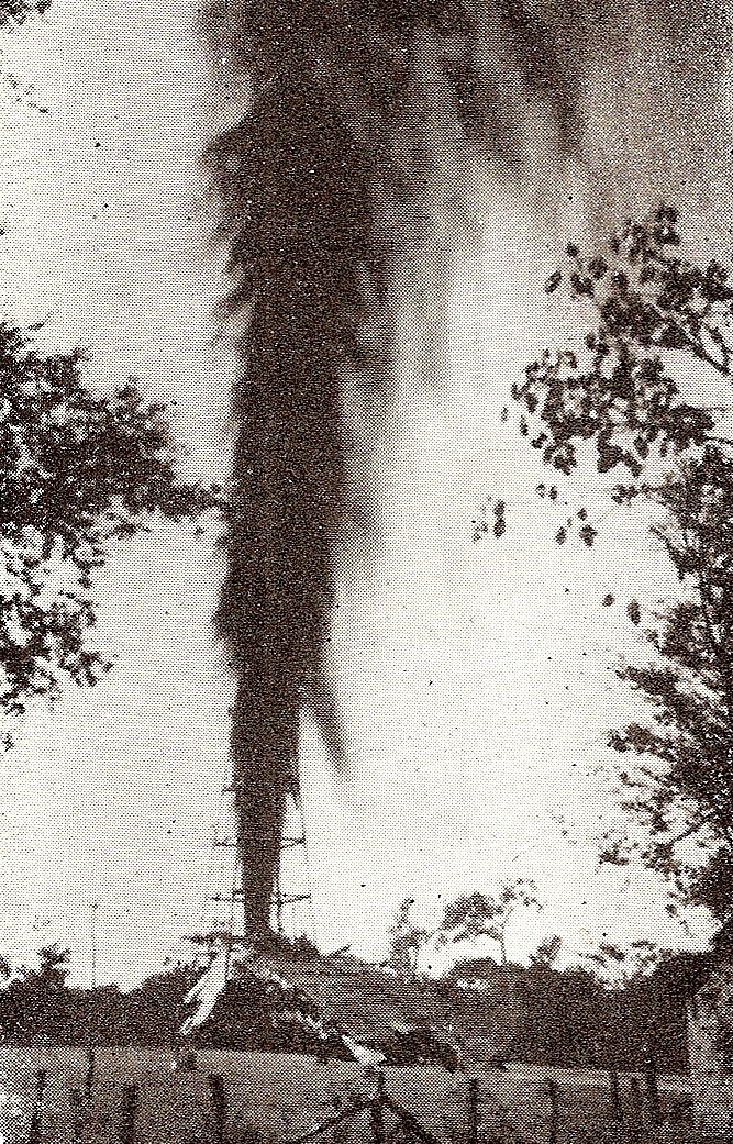 Reventon del pozo Barrosos nº2 en el area campo del campo La Rosa, estado Zulia - Venezuela